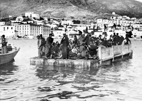 Near East Relief'te yayımlanan bir fotoğraf. Mübadele ile Yunanistan’a gidecek Samsunlu Rumlar sallarla onları götürecek gemiye taşınıyor.